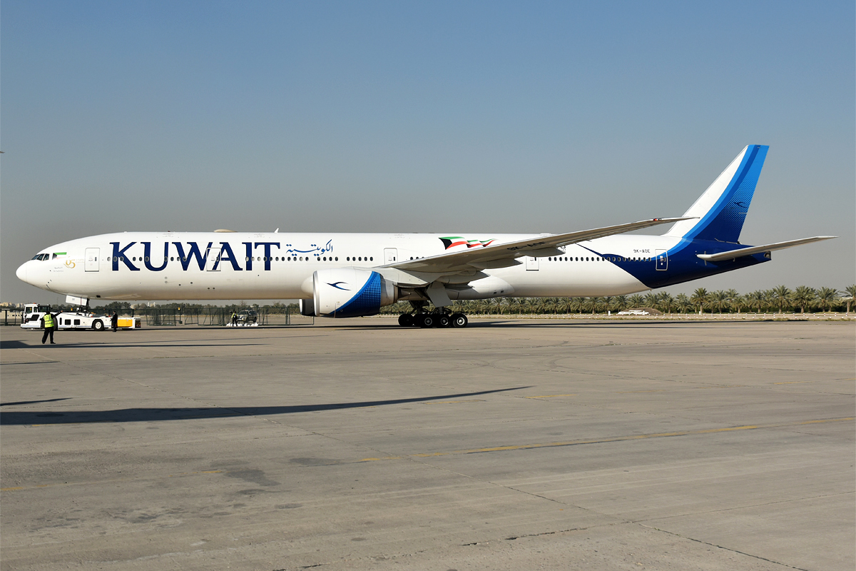 Kuwait Airways, 9K-AOE, Boeing 777-369 ER